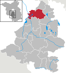 Ludwigsfelde in Brandenburg (Country) - District Teltow-Fläming